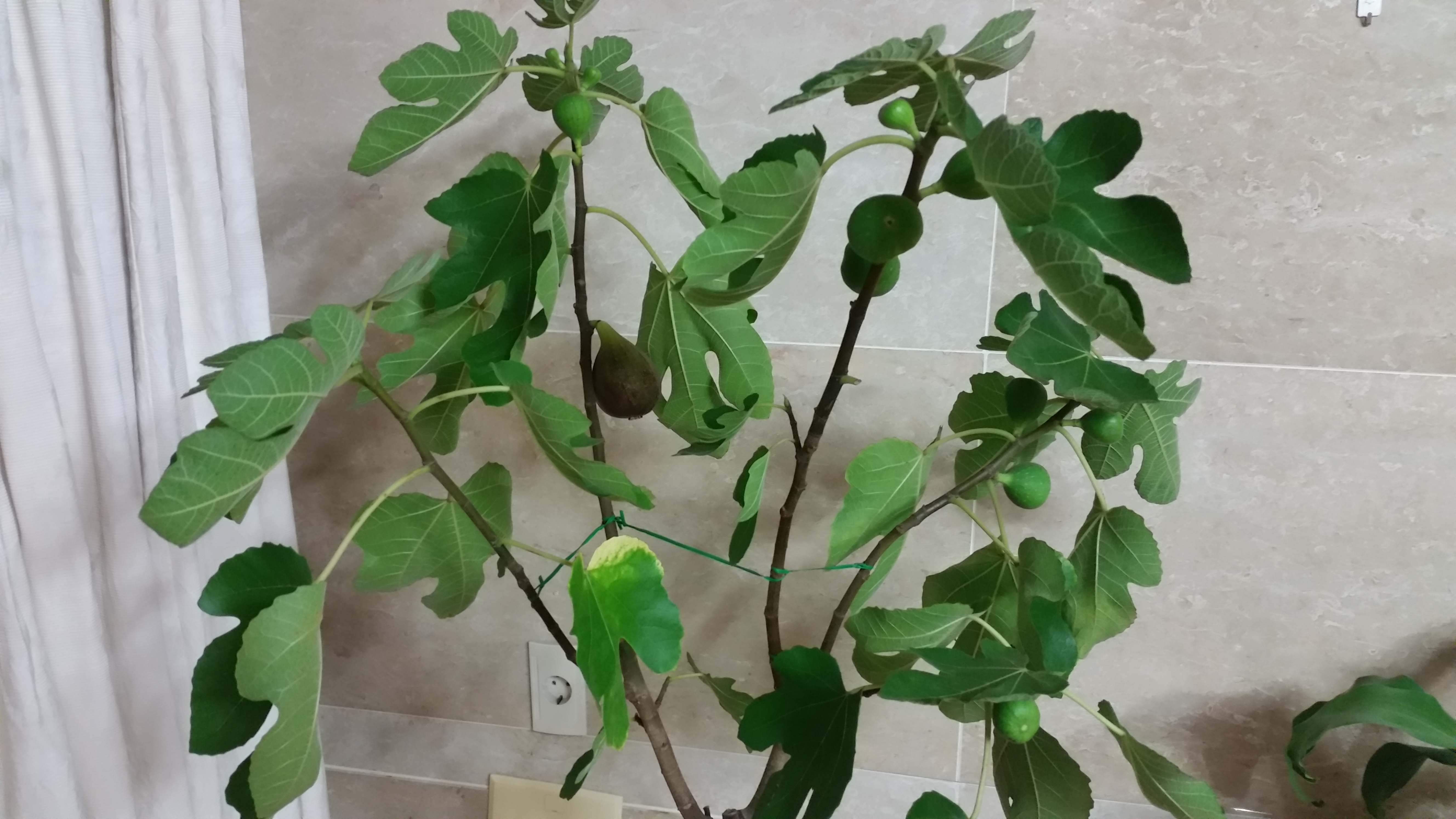 무화과 열매들